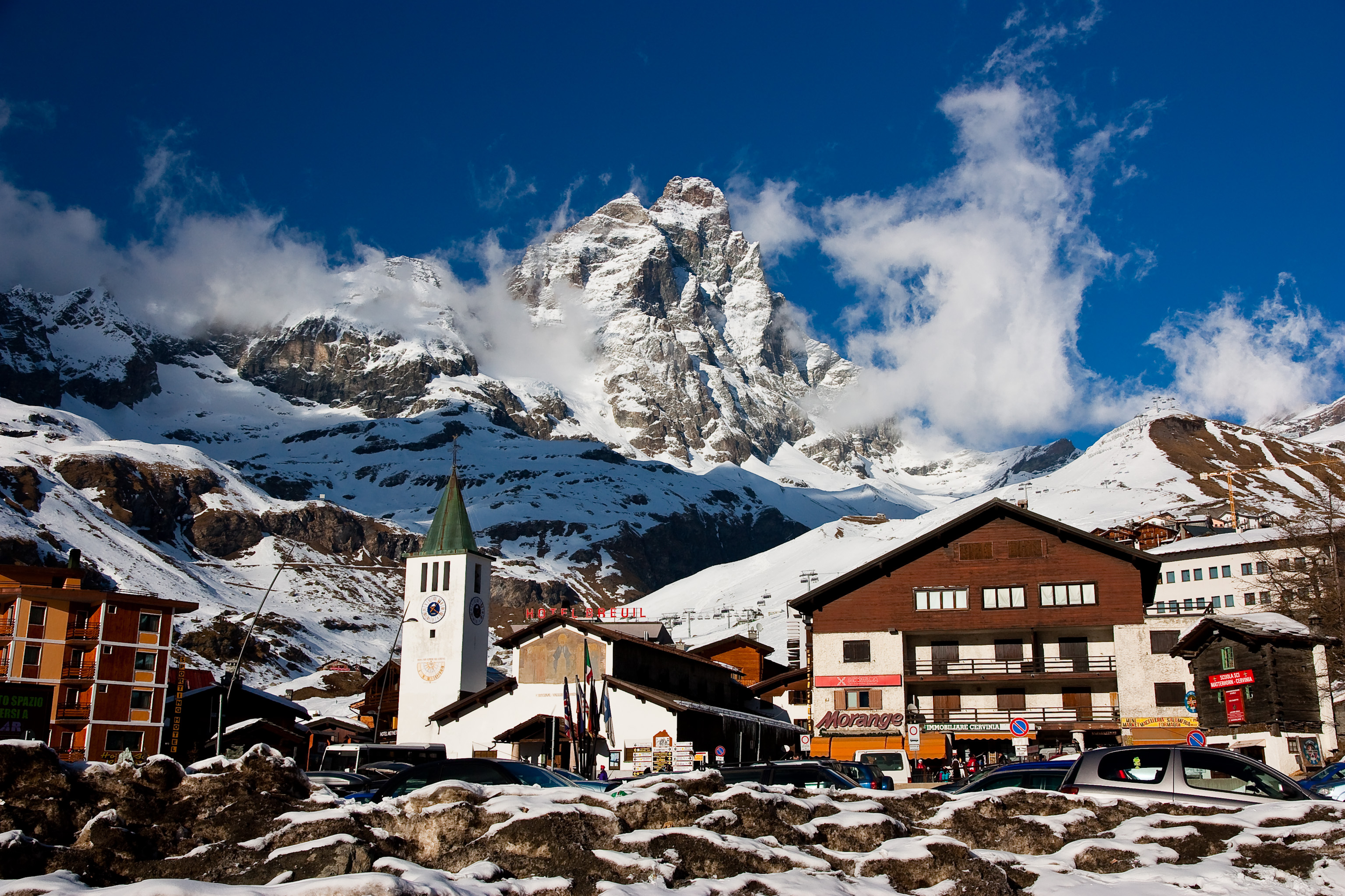 Червиния. Центральная площадь.